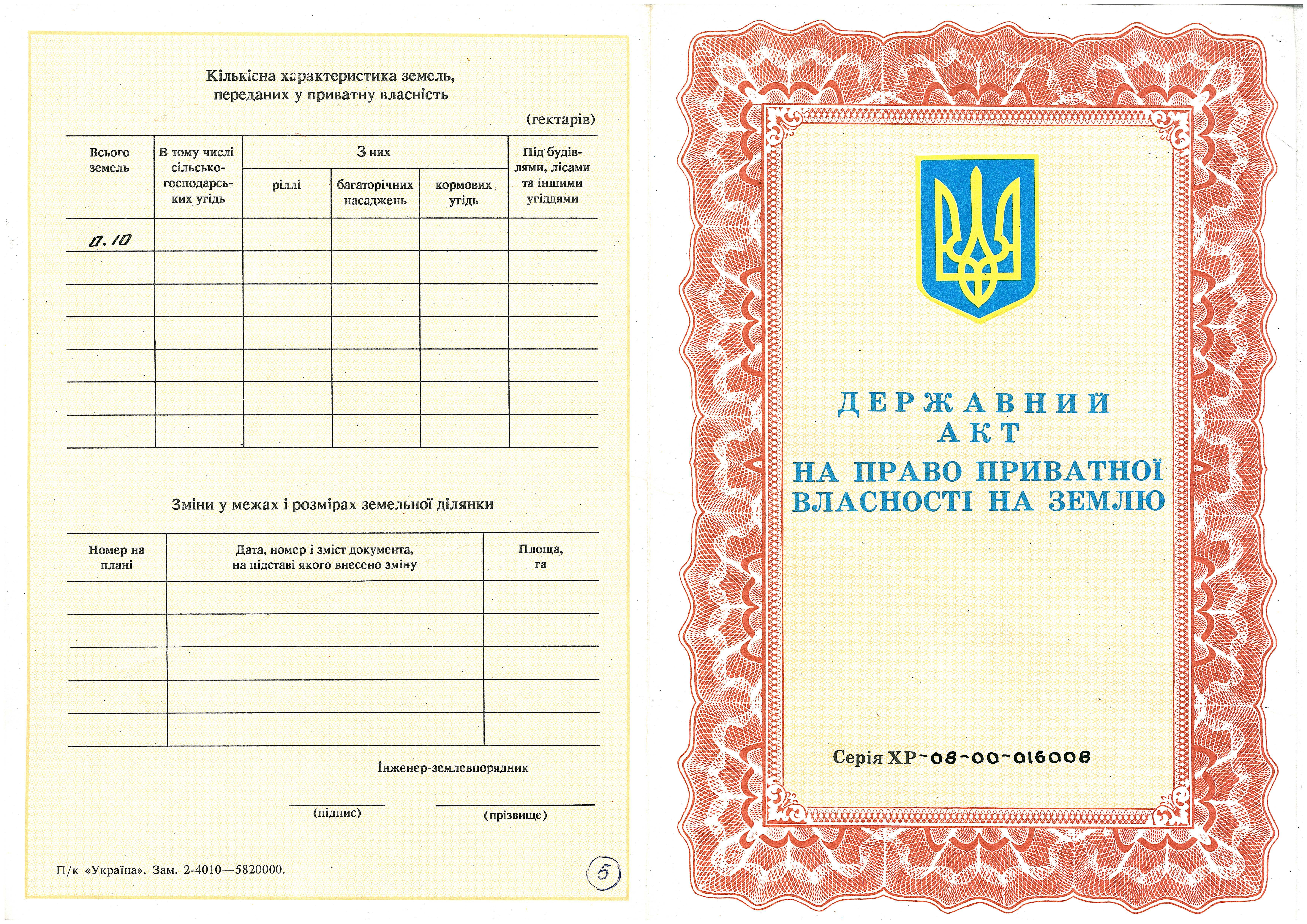 Государственный акт на право частной собственности на землю (10 соток). Украина, 1994 год. Сторона А.